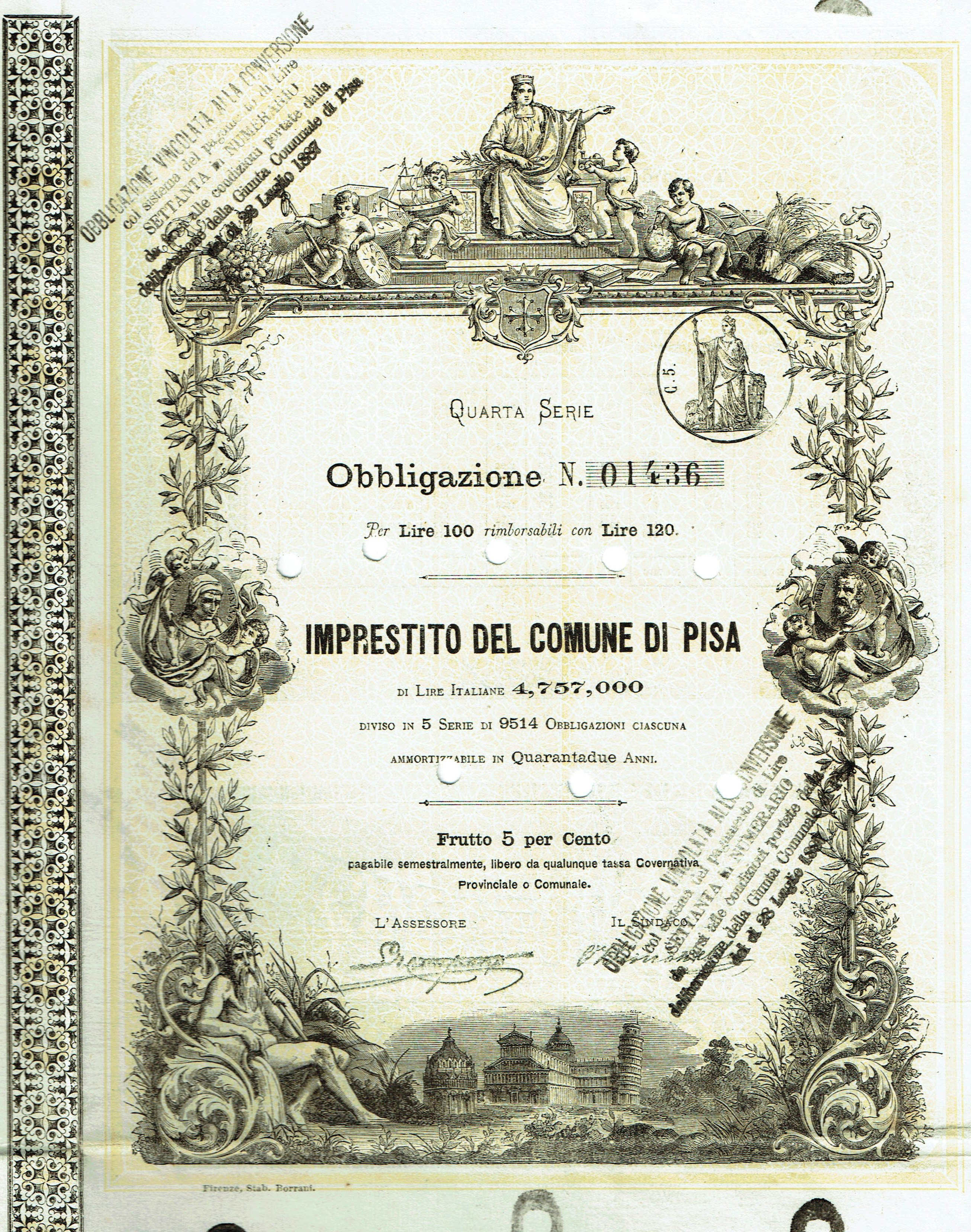 5% Imprestito del Comune di Pisa; Obbligazione al portatore di 100 Lire – quarta serie. Pisa 1871. Titolo molto decorativo: ricca cornice con stemma, Italia con corona turrita, puttini, effigi dei celebri Nicola Pisano e Galileo, Nettuno, elementi simbolici e suggestivo scorcio della bella Piazza dei Miracoli.